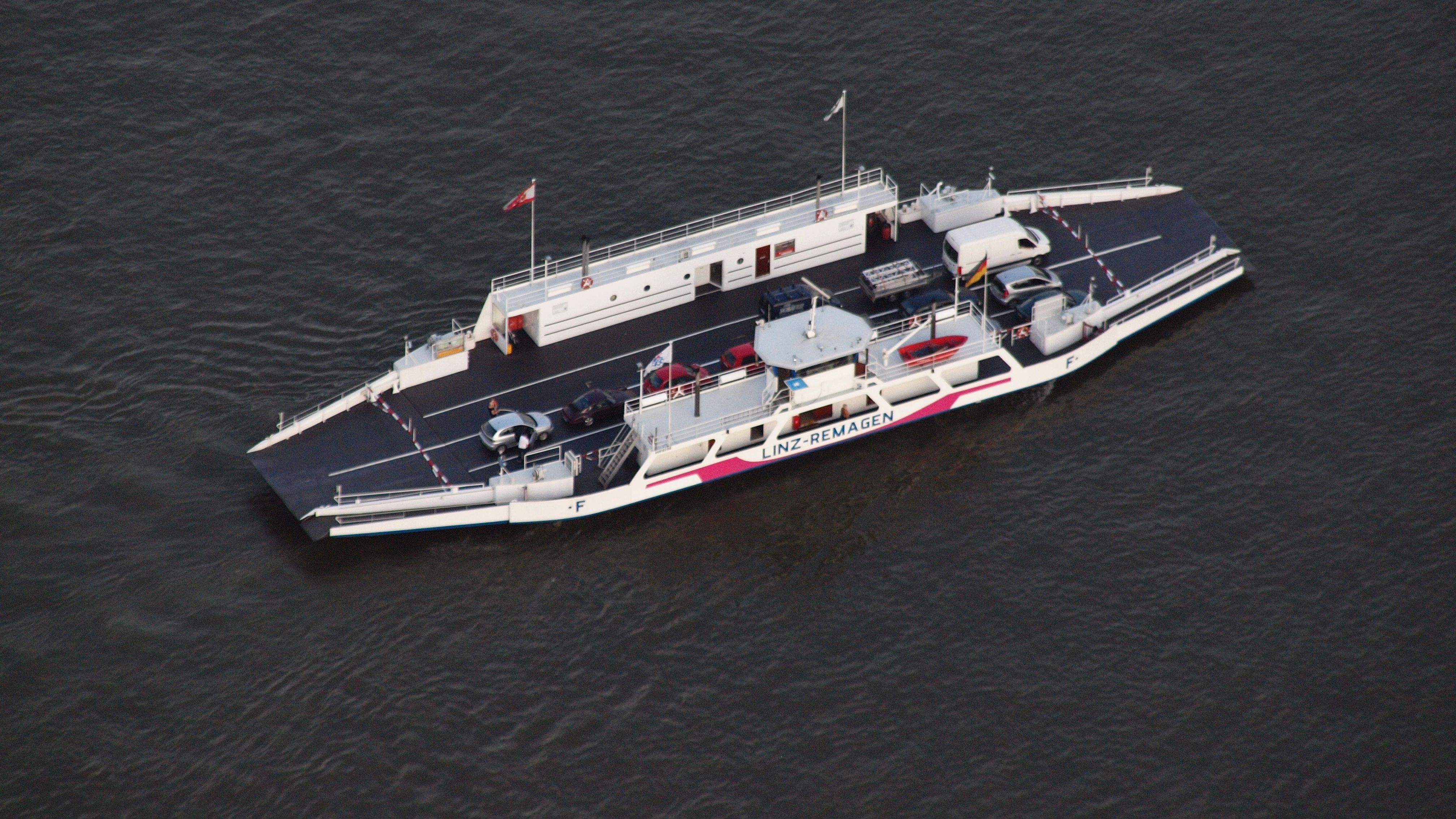 Rheinfähre von Linz nach Remagen-Kripp: Luftaufnahme